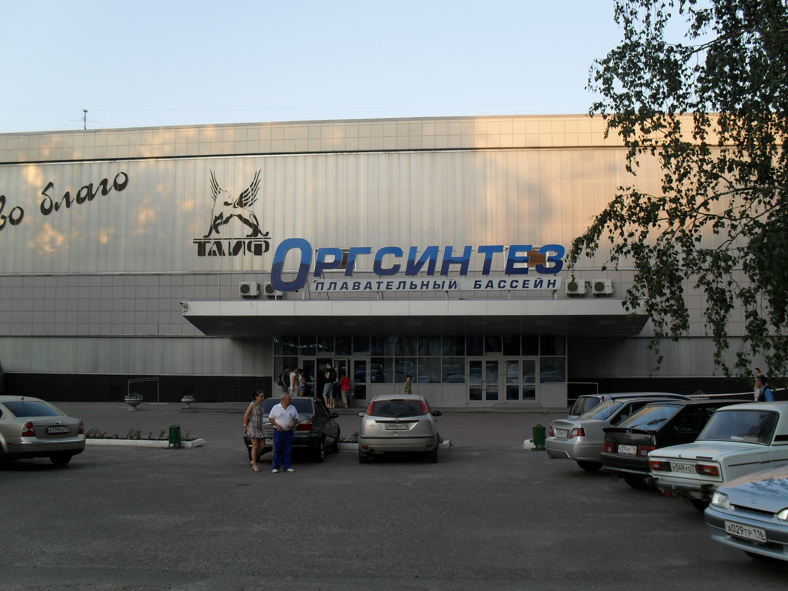 Фасад бассейна Оргсинтез (Казань)